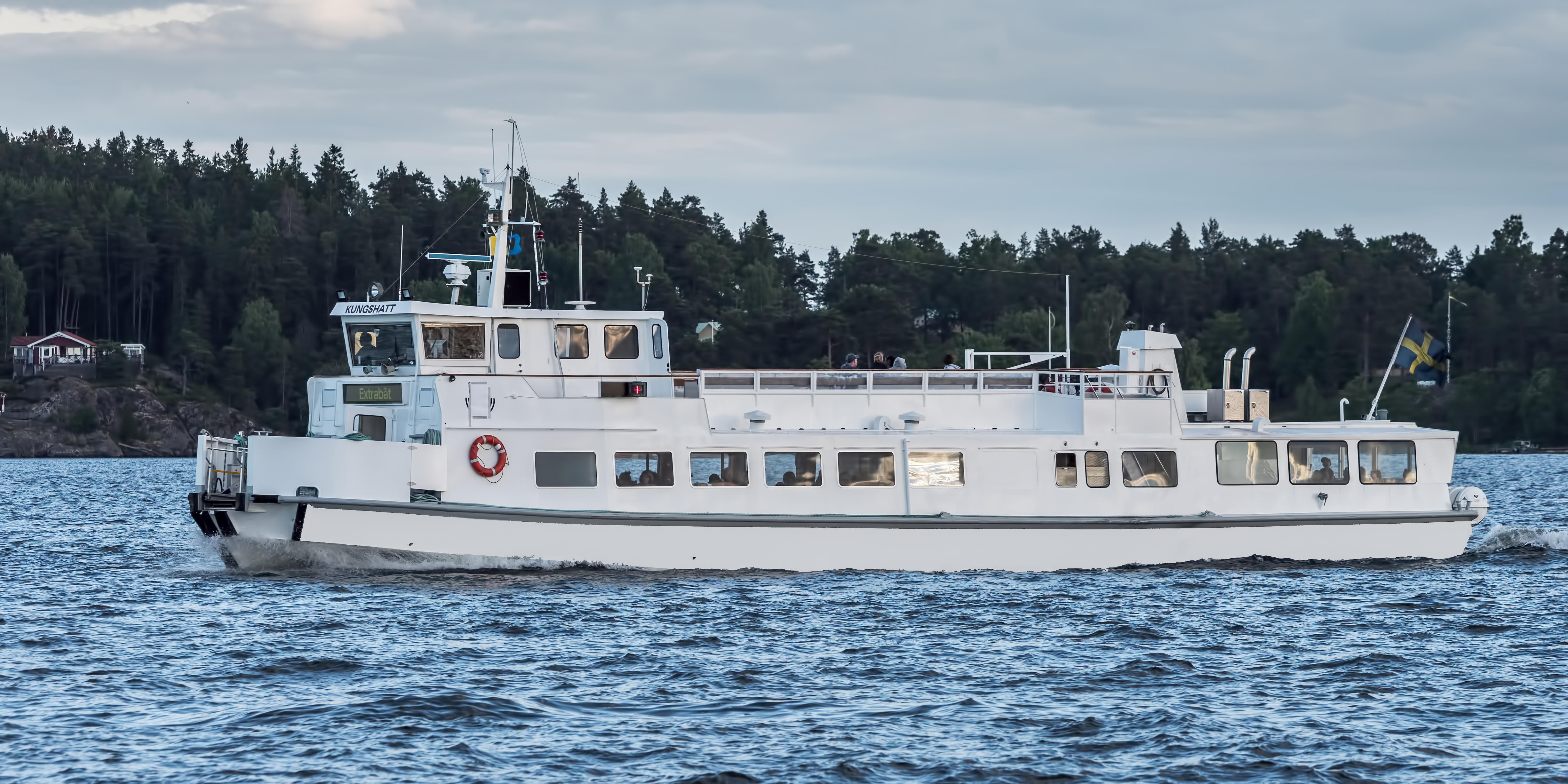 Kungshatt